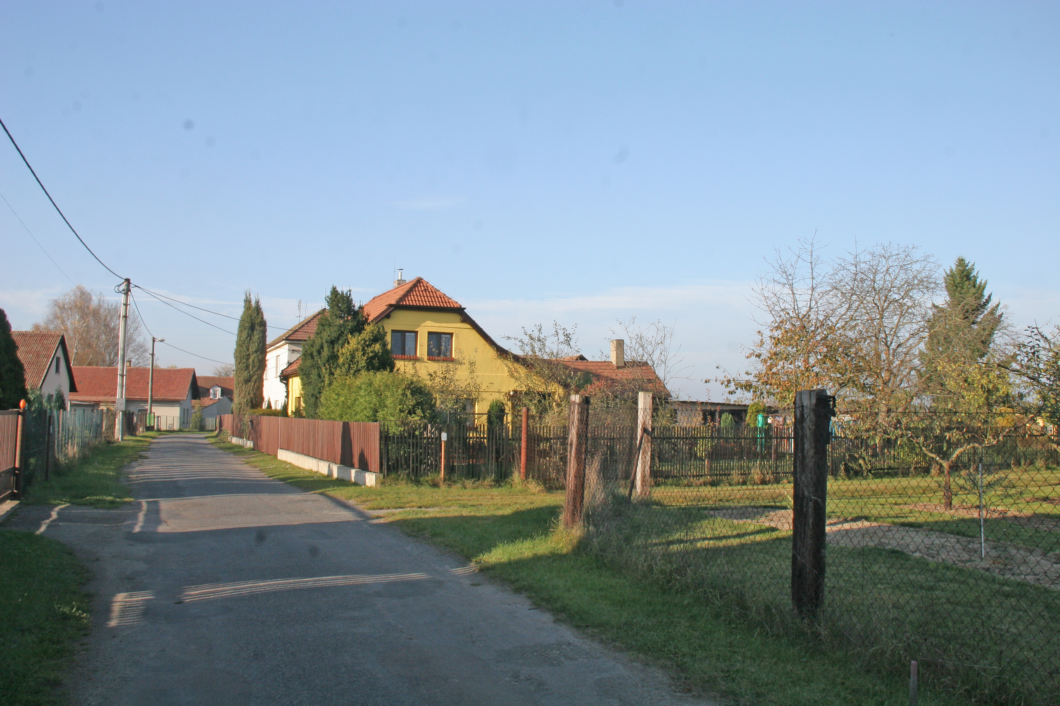 Poběžovice čp. 82